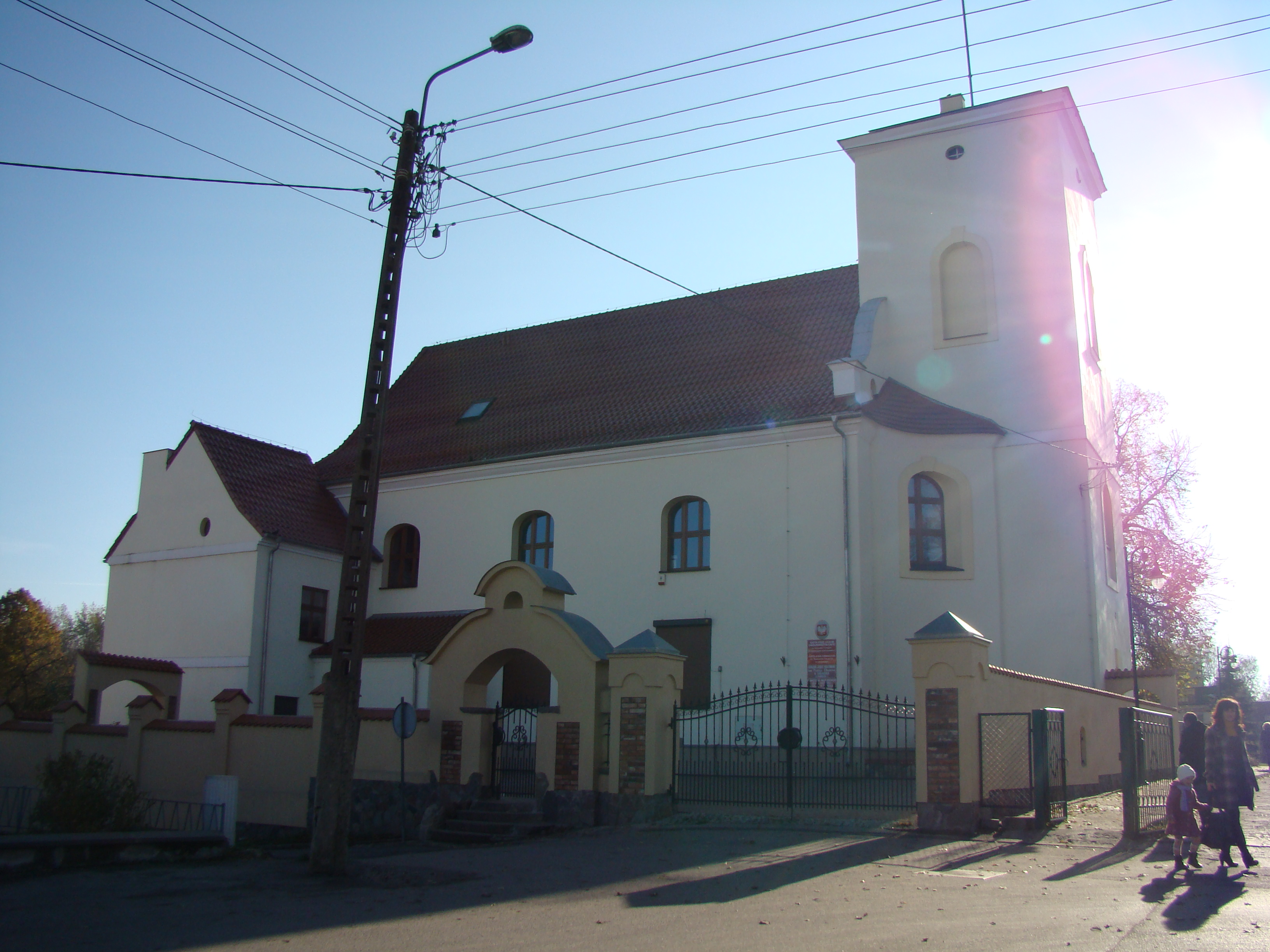 Chojnice, ul. Grunwaldzka 1 - dawny kościół klasztorny augustianów, obecnie Katolickie Liceum Ogólnokształcące wraz z Gimnazjum Katolickim, 1712-1719, 1819-1826.